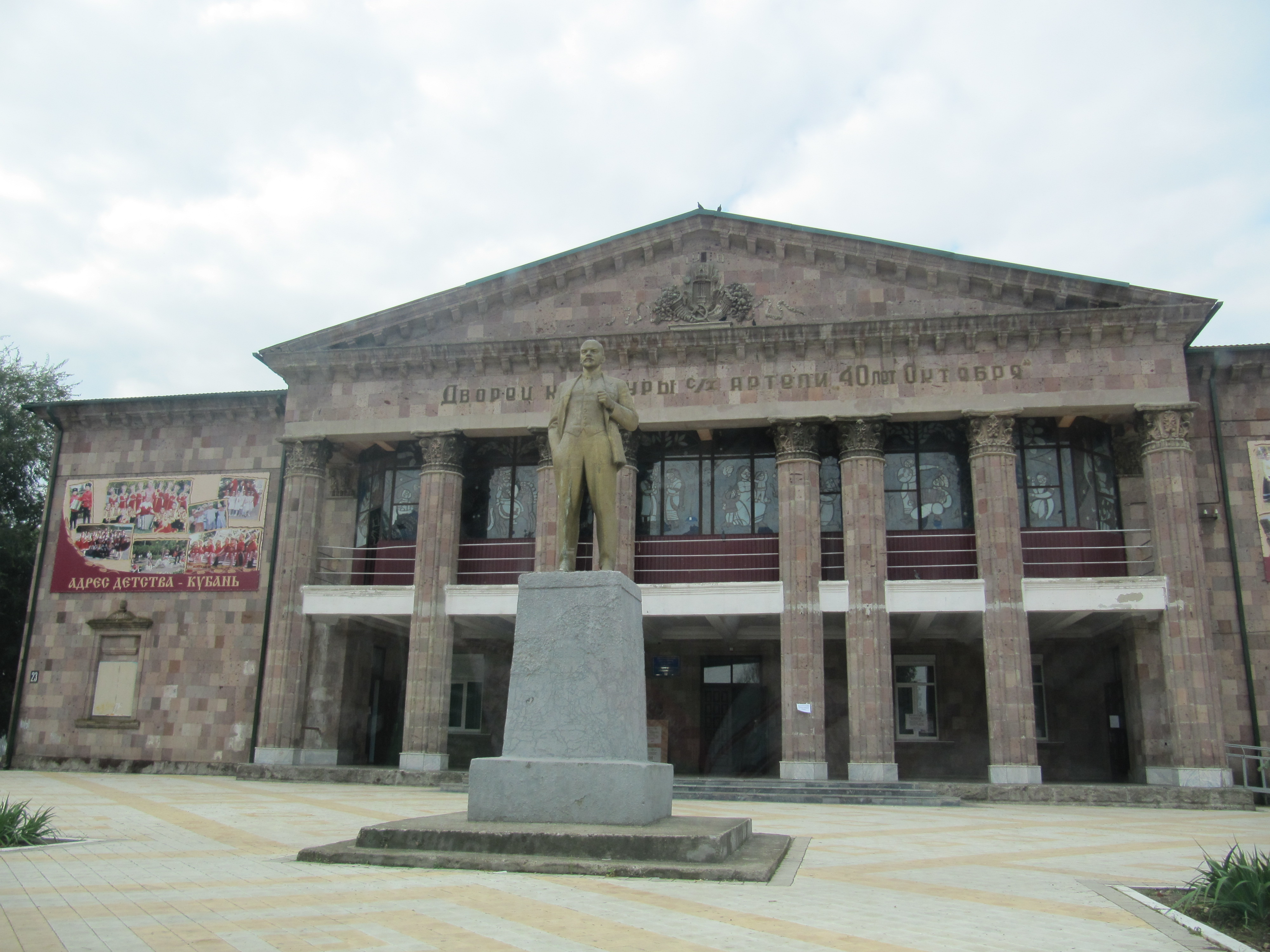 Станица Динская